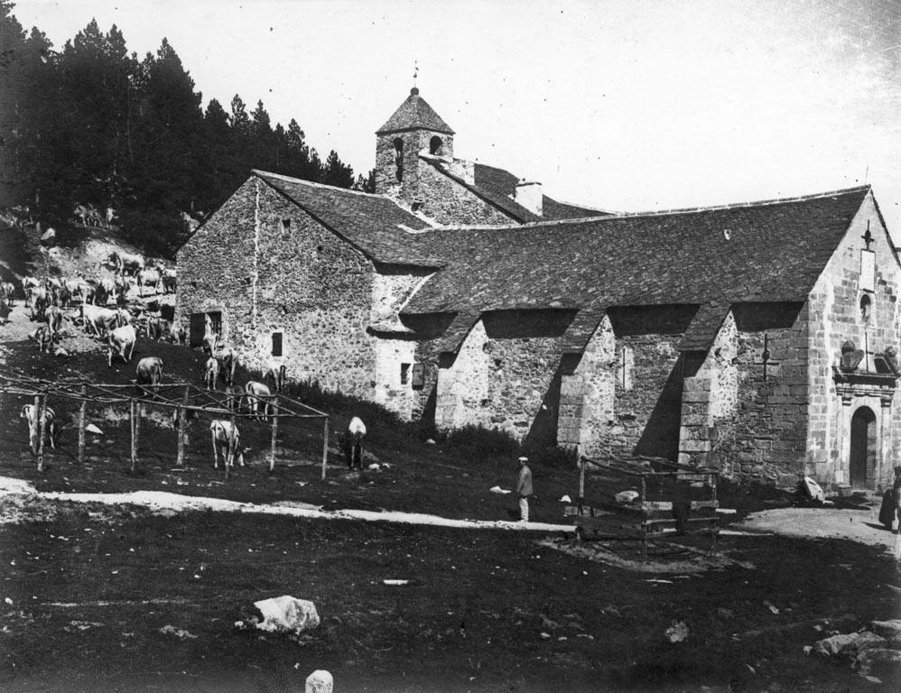 Vista lateral del Santuari de Font-Romeu amb vaques pastant i un home. Cèsar August Torras i Ferreri (Entre 1890 i 1923) .